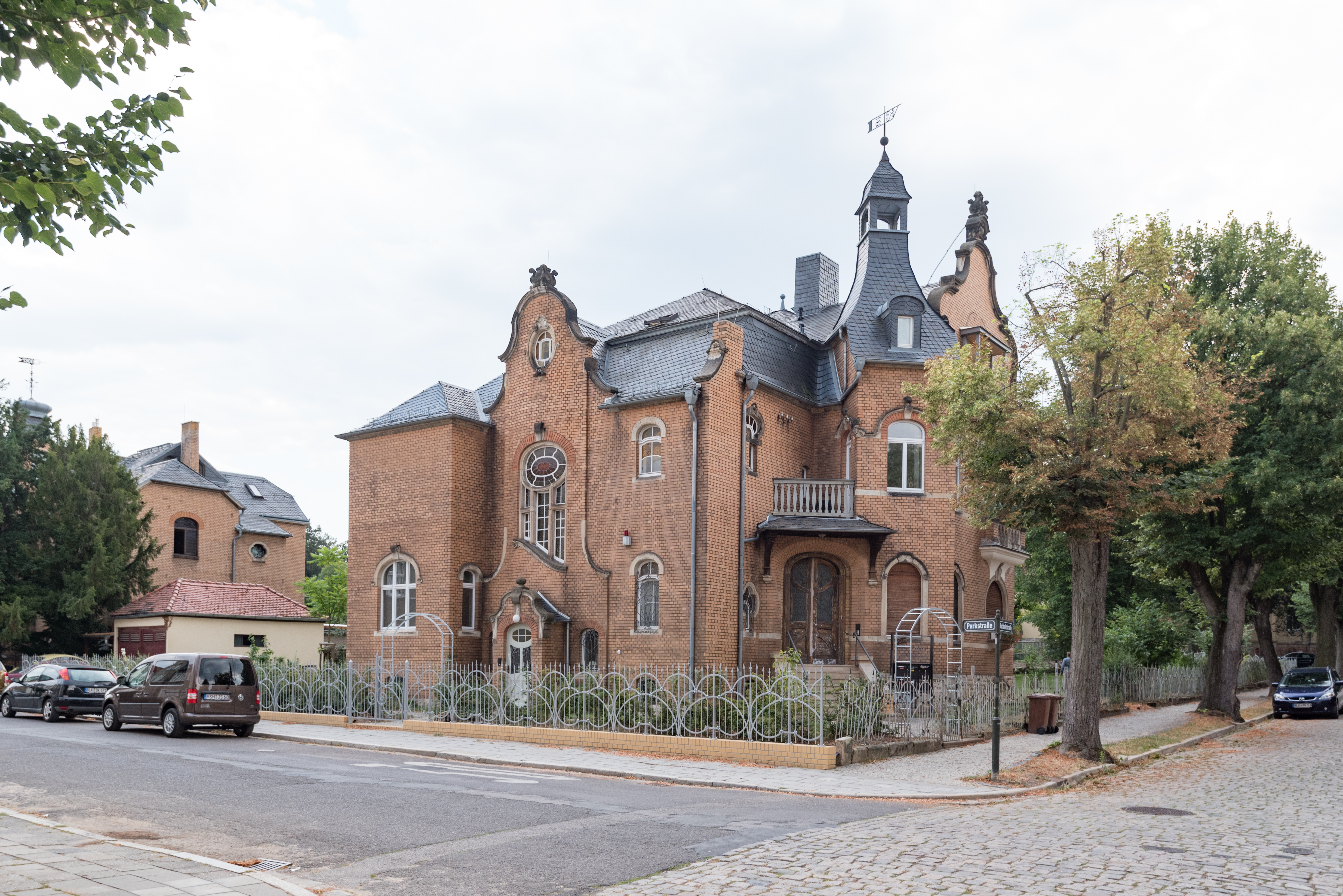 Naumburg (Saale), Buchholzstraße 10